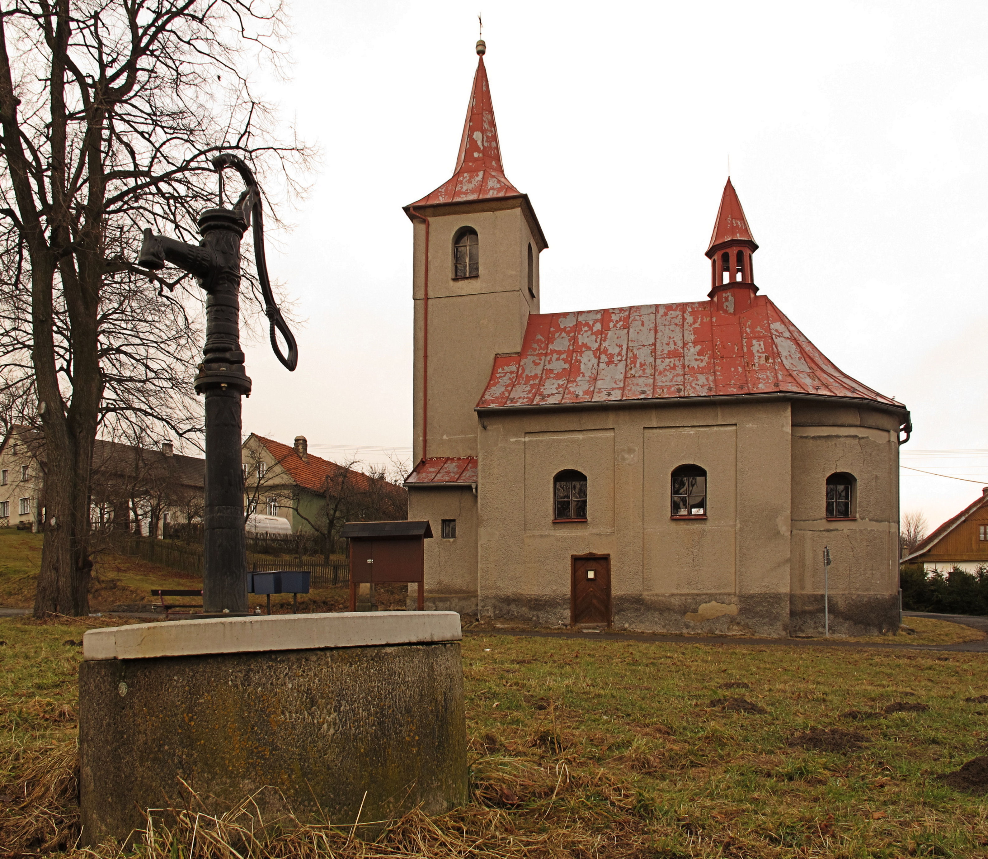 Středolesí